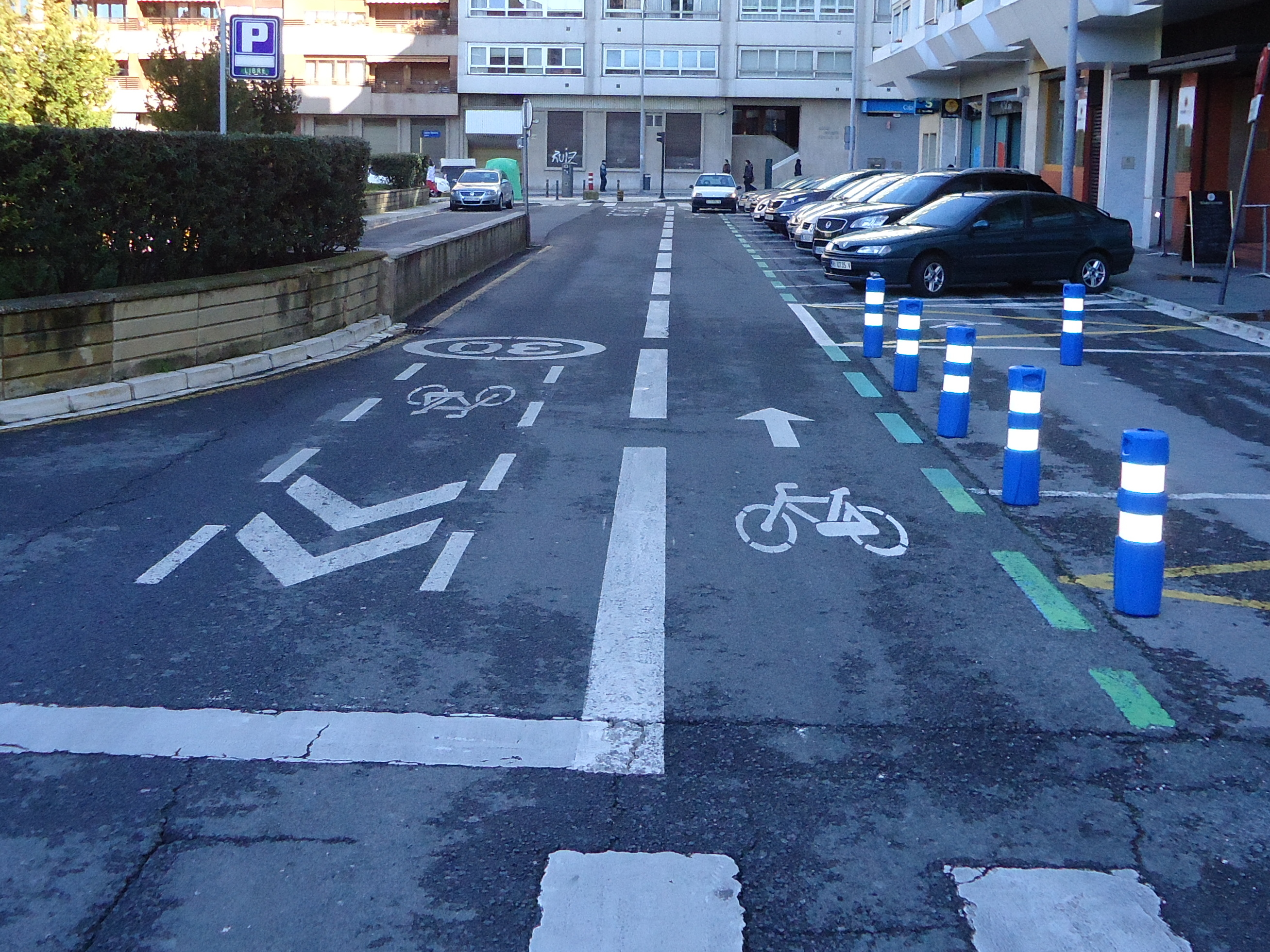 Santa Barbara plazako (Gasteiz) bizikleta lerroak